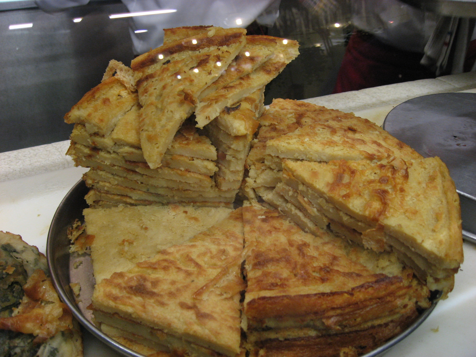 La fainâ fatta in Argentina. Fainâ made in Argentina.